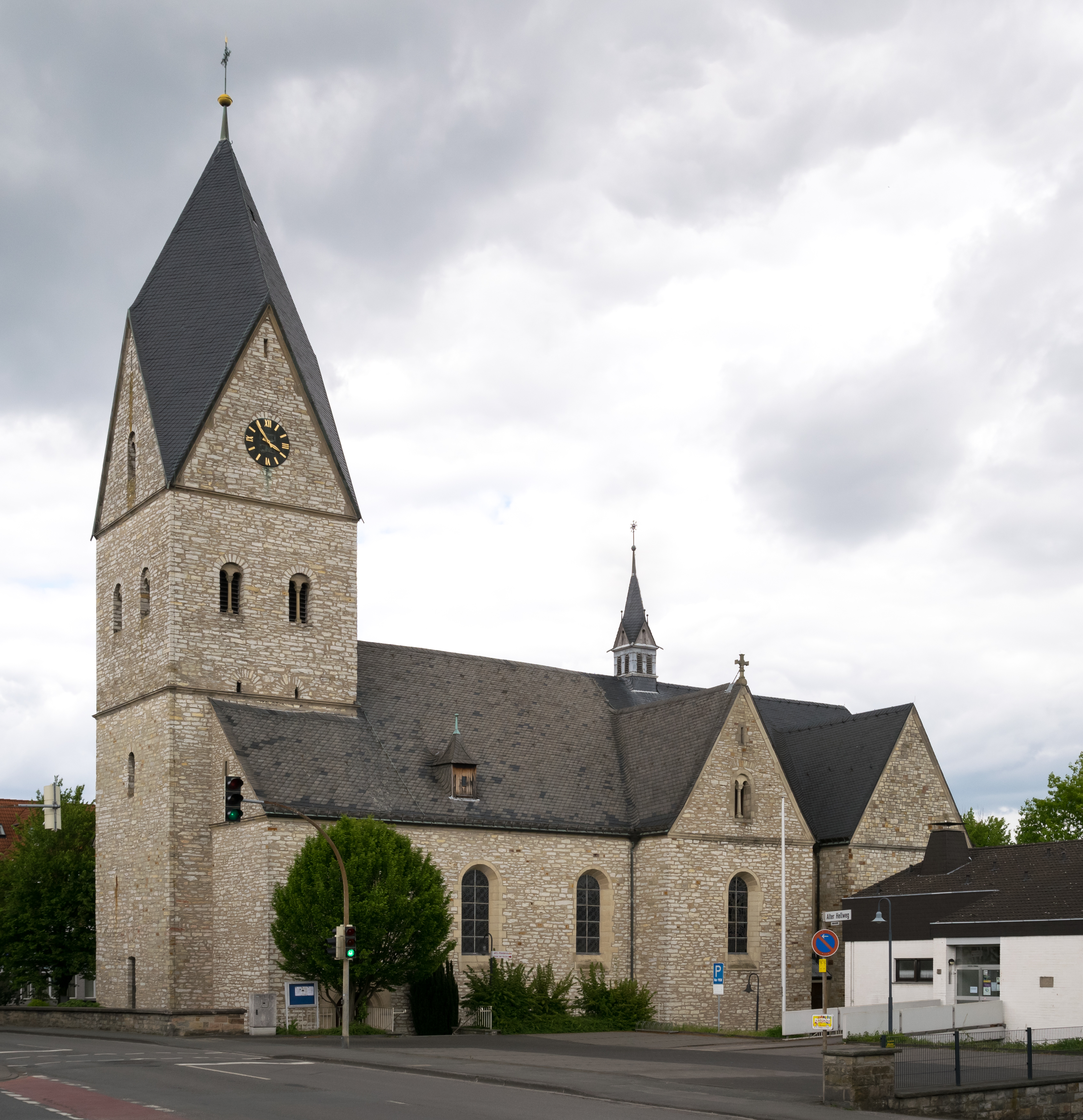 Katholische Kirche St. Johann Baptist in Paderborn-Wewer